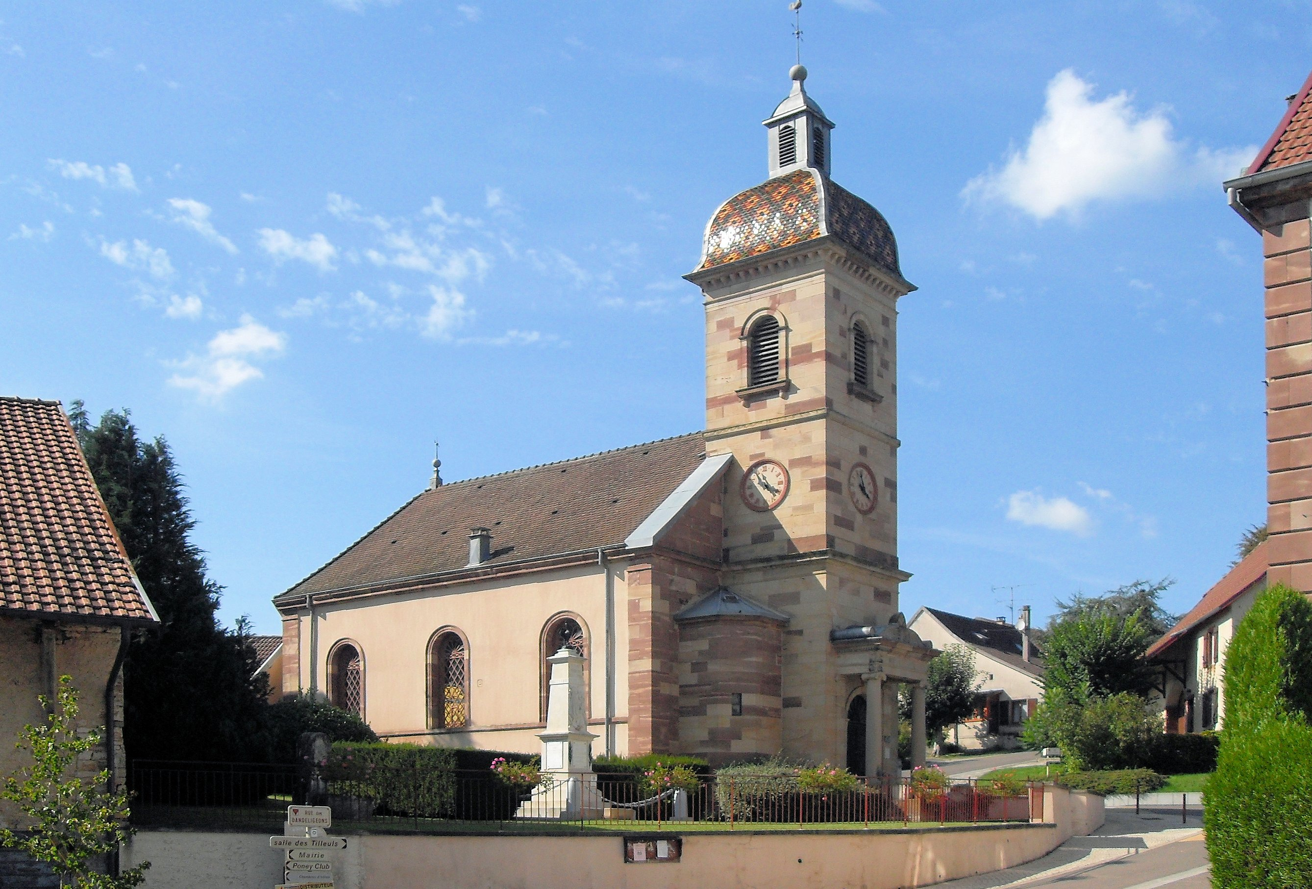 L'église luthérienne de Vyans-le-Val